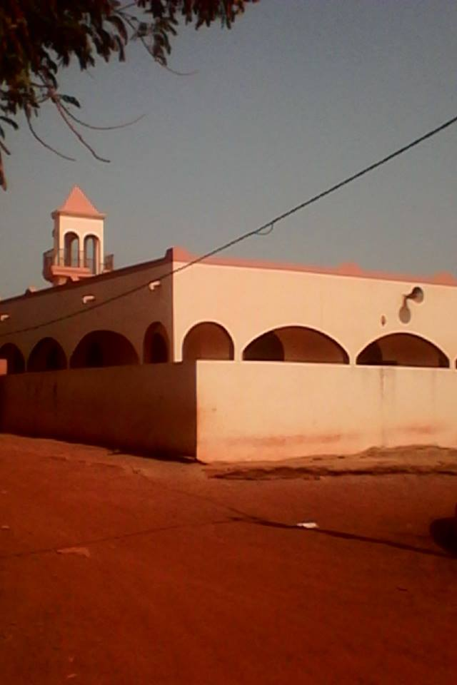 Grande Mosquée de Diabarou